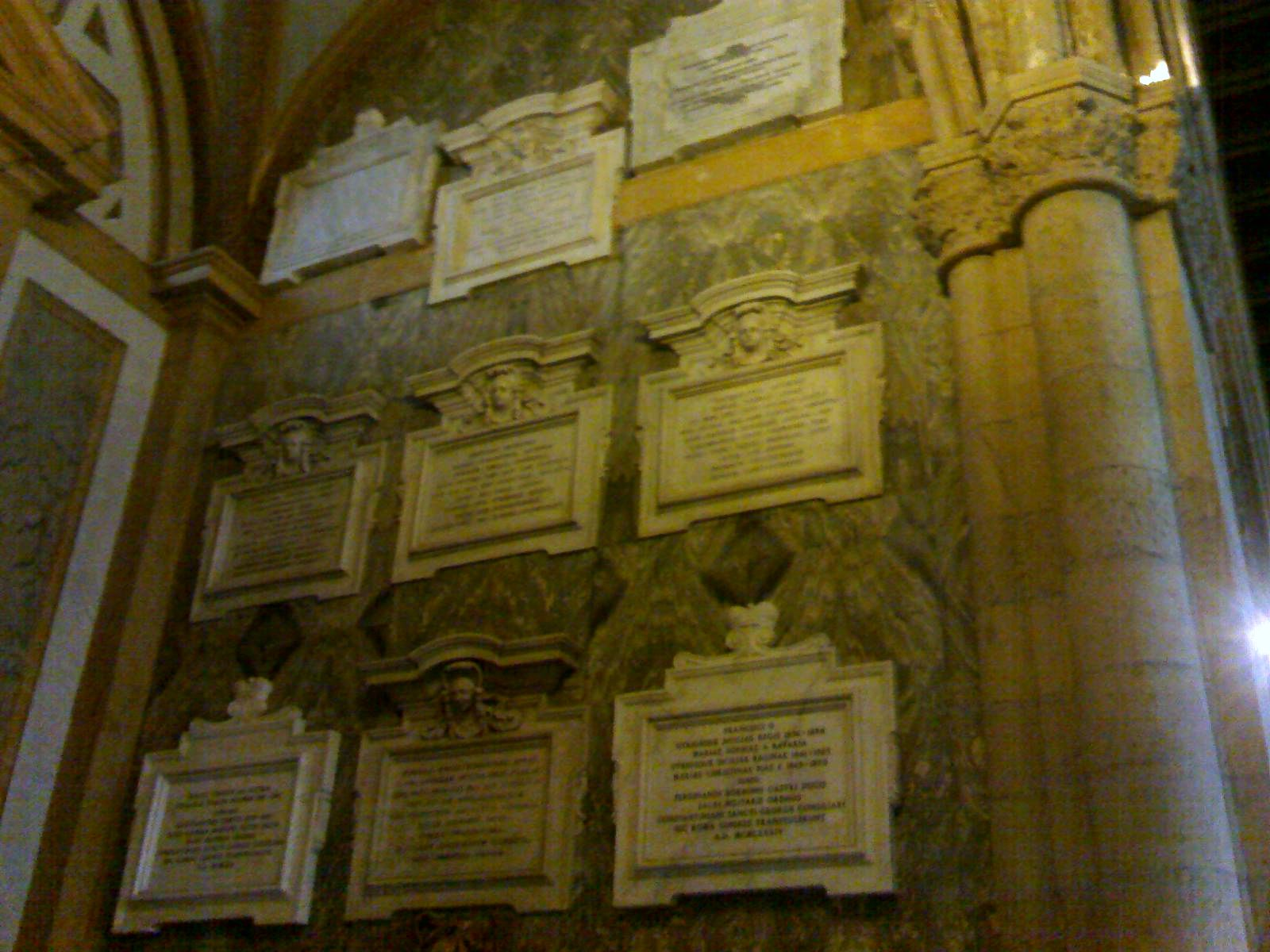 Cappella dei Borbone - Sepolcri dei familiari dei Borbone (Basilica di Santa Chiara - Napoli)